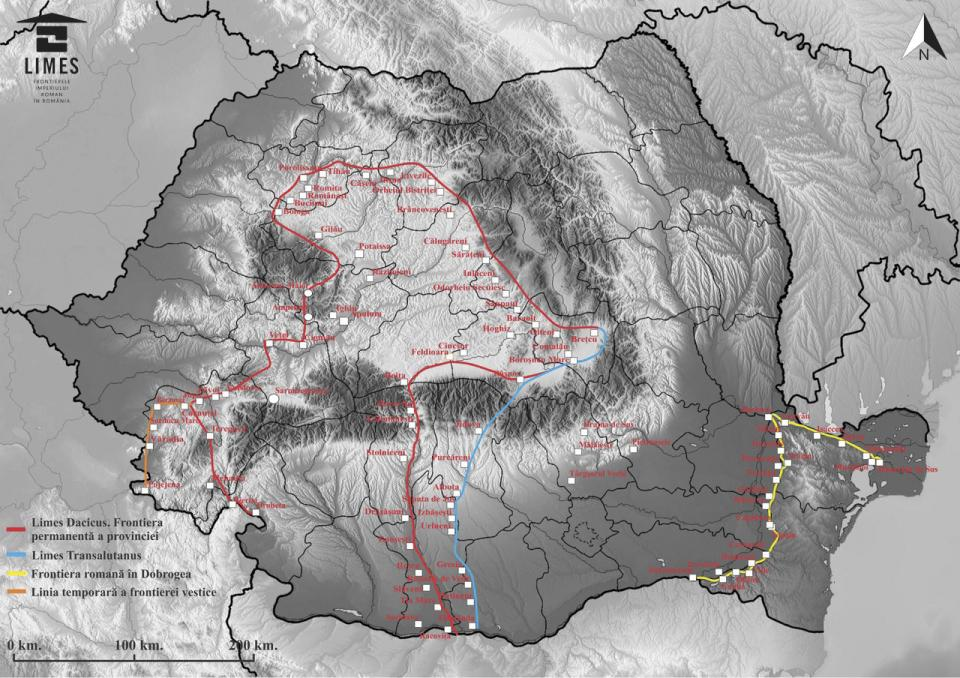 Map of Roman Dacia (106-271).